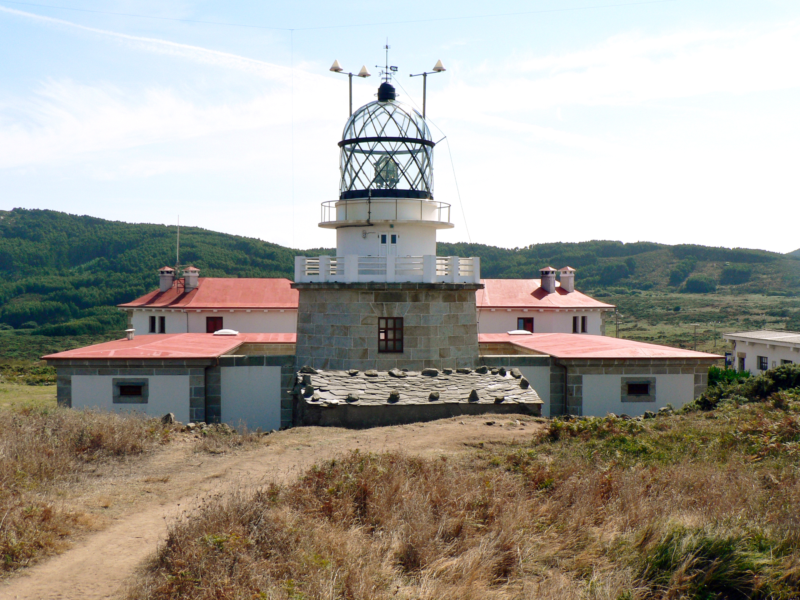 Faro da Estaca de Bares / Faro Punta de la Estaca de Bares.